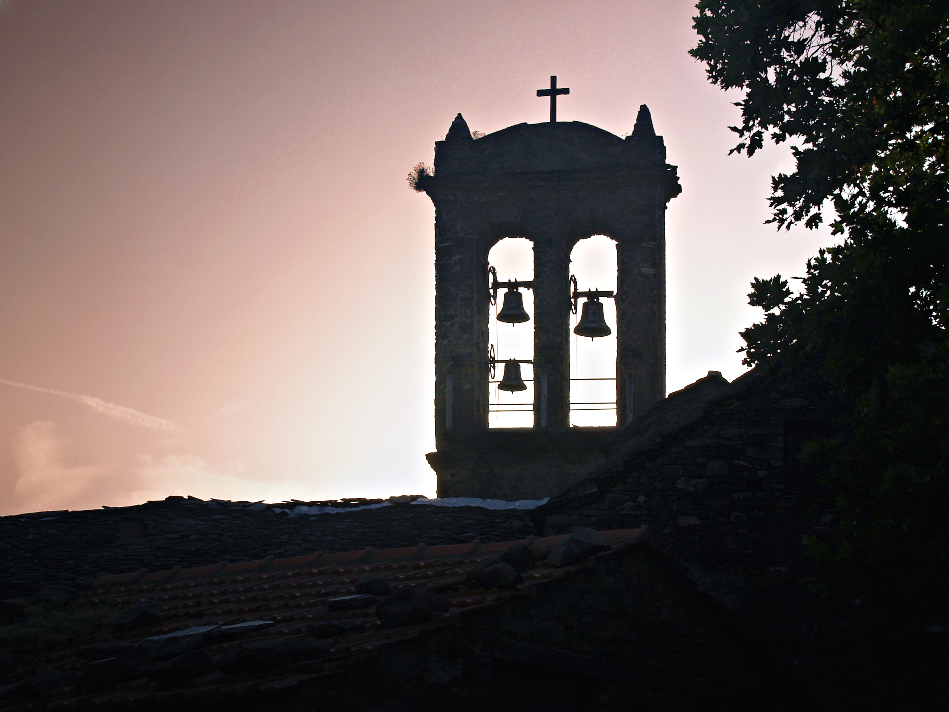 Alando (Corsica) - Couvent d'Alandu - Clocher de l'église conventuelle